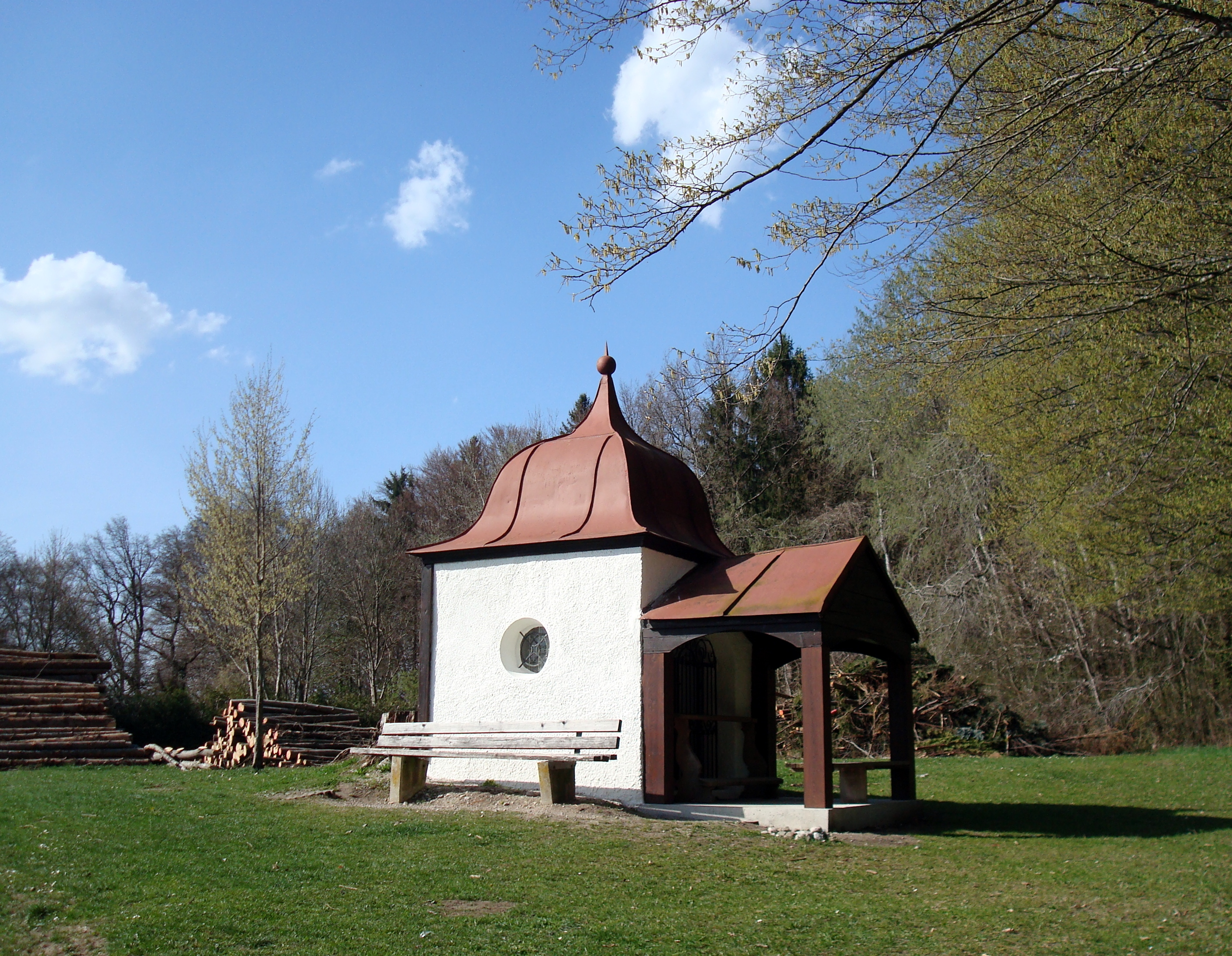 Berg am Starnberger See, Kapelle St. Anna, Berger Holz. Die Wegkapelle am Waldrand mit geschweiftem Kuppeldach und hölzernem Vorbau wurde 1826 anstelle eines Vorgängerbaus aus dem 18. Jahrhundert erbaut.